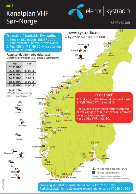 Kanalplan Kystradio Sør